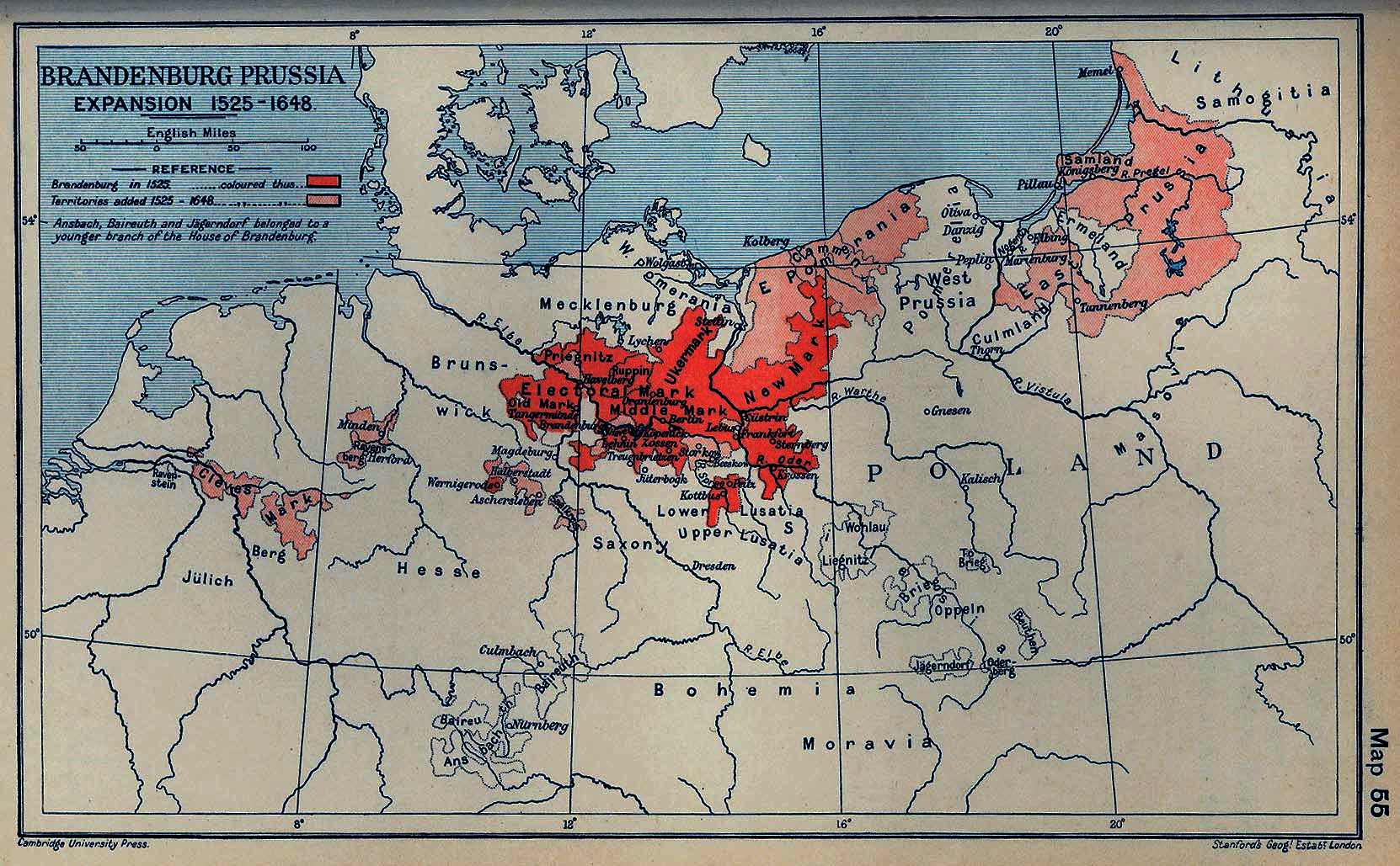 Territoriale Gewinne von Brandenburg Preußen von 1525 bis 1648